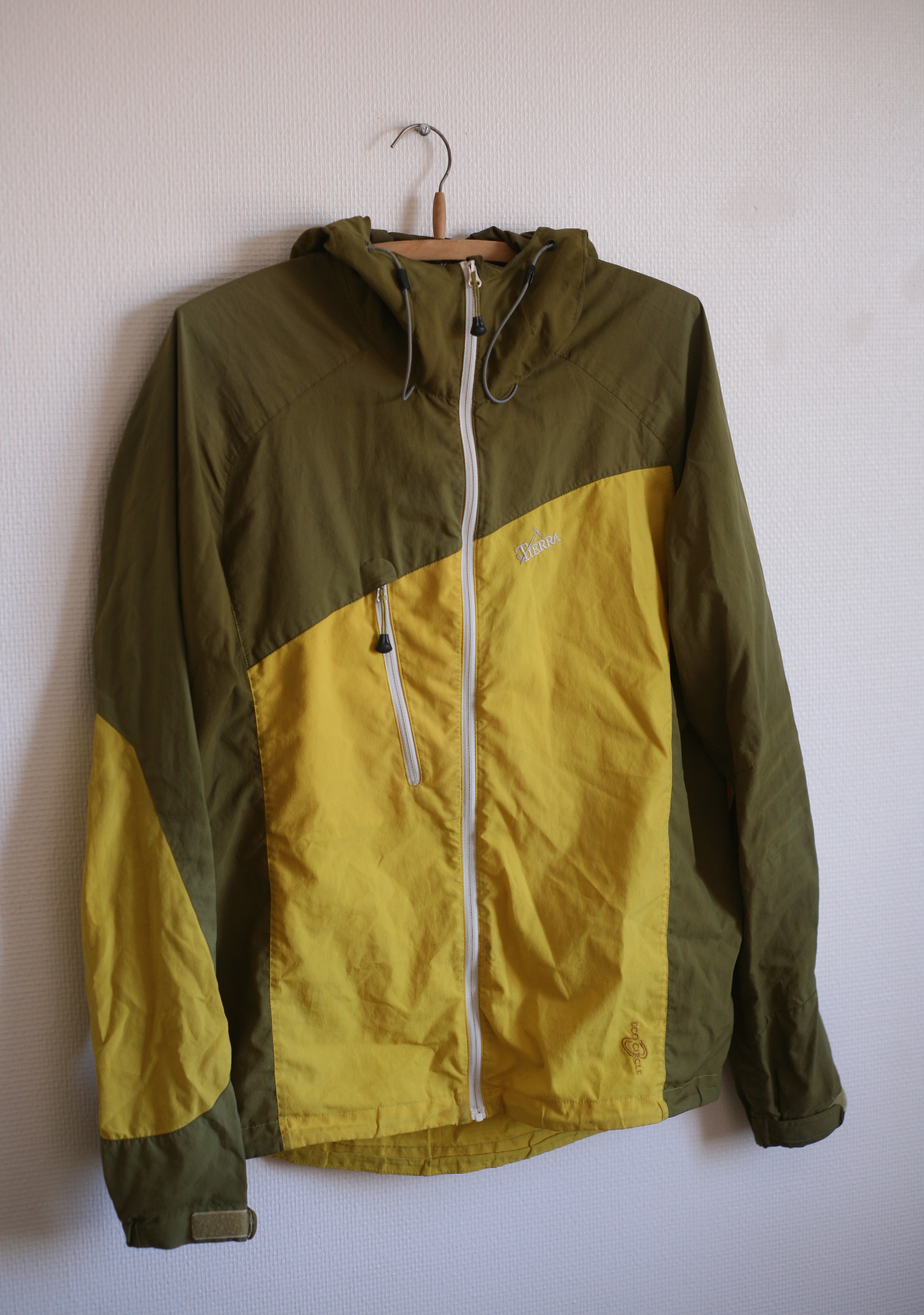 Vindjacka från den svenska friluftstillverkaren Tierra.